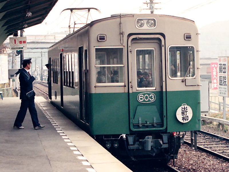 叡山電鉄 二軒茶屋駅旧上りホーム／登場時のデオ600形